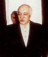 Fethullah Gülen beim Papst